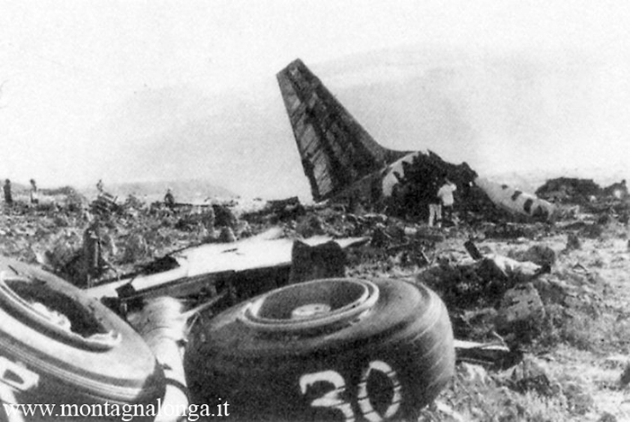 Последствия авиационной катастрофы самолёта Douglas DC-8 близ Палермо